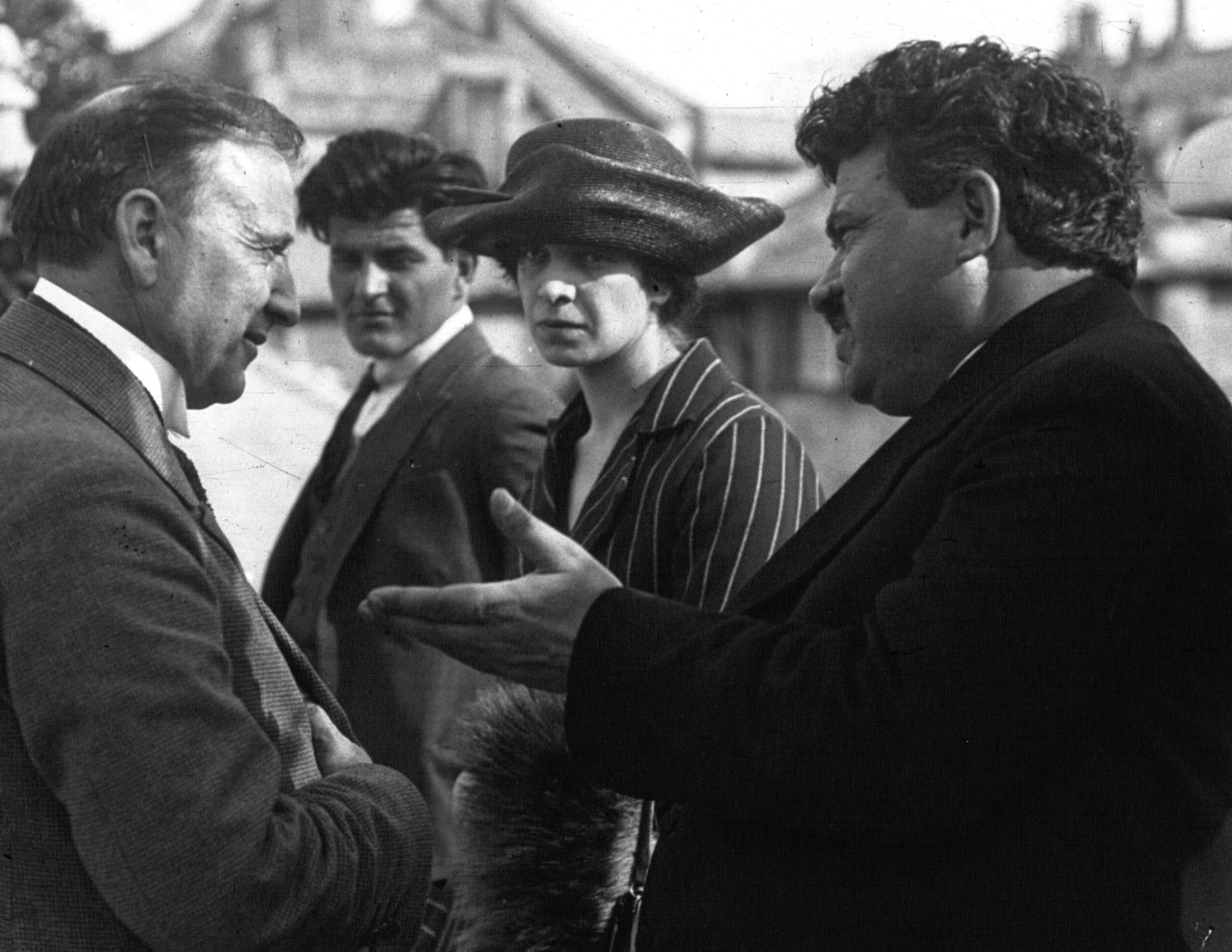 Министър-председателите на Украйна и България Кръстьо Раковски и Александър Стамболийски по време на Конференцията в Генуа